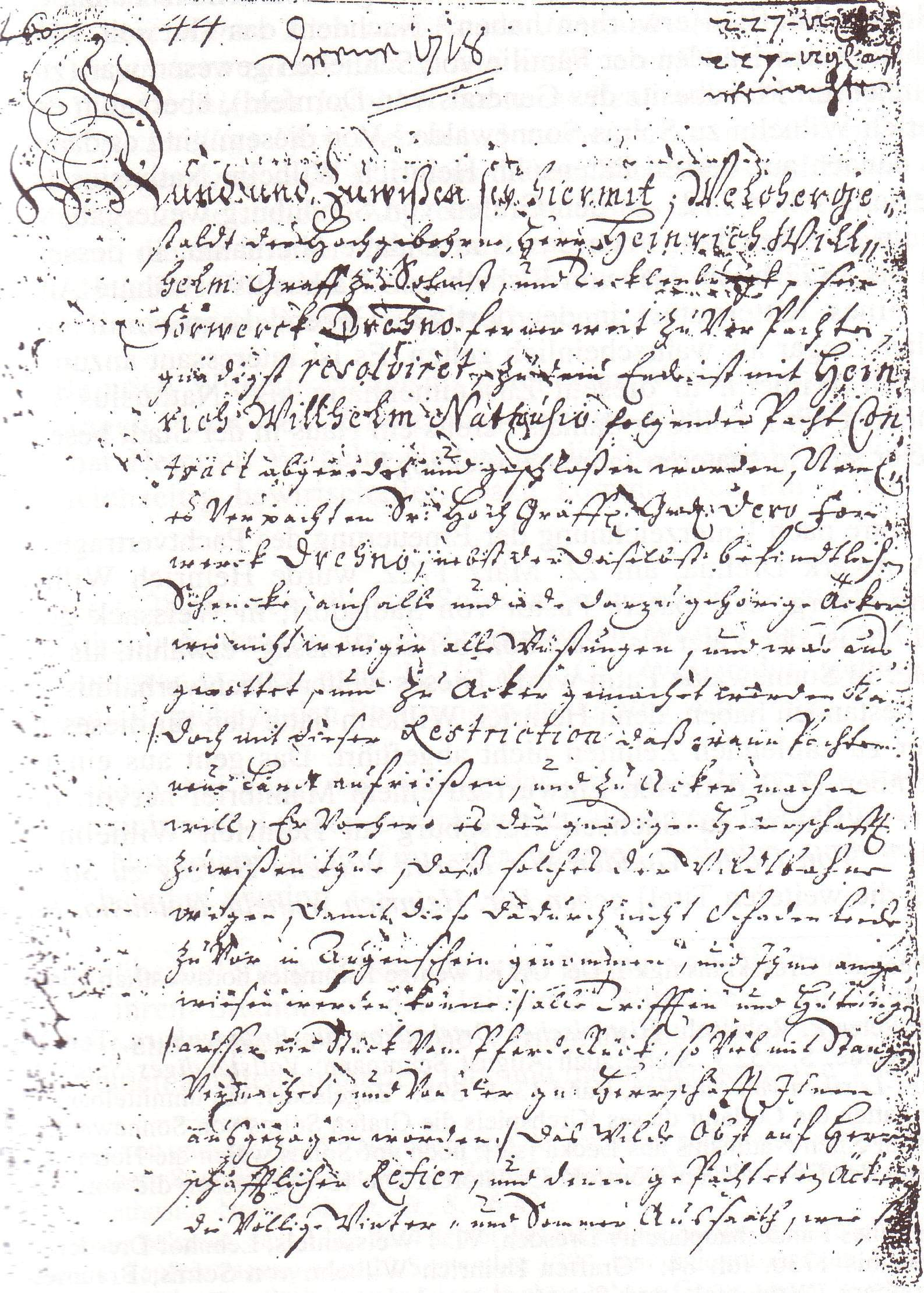 rent contract farm